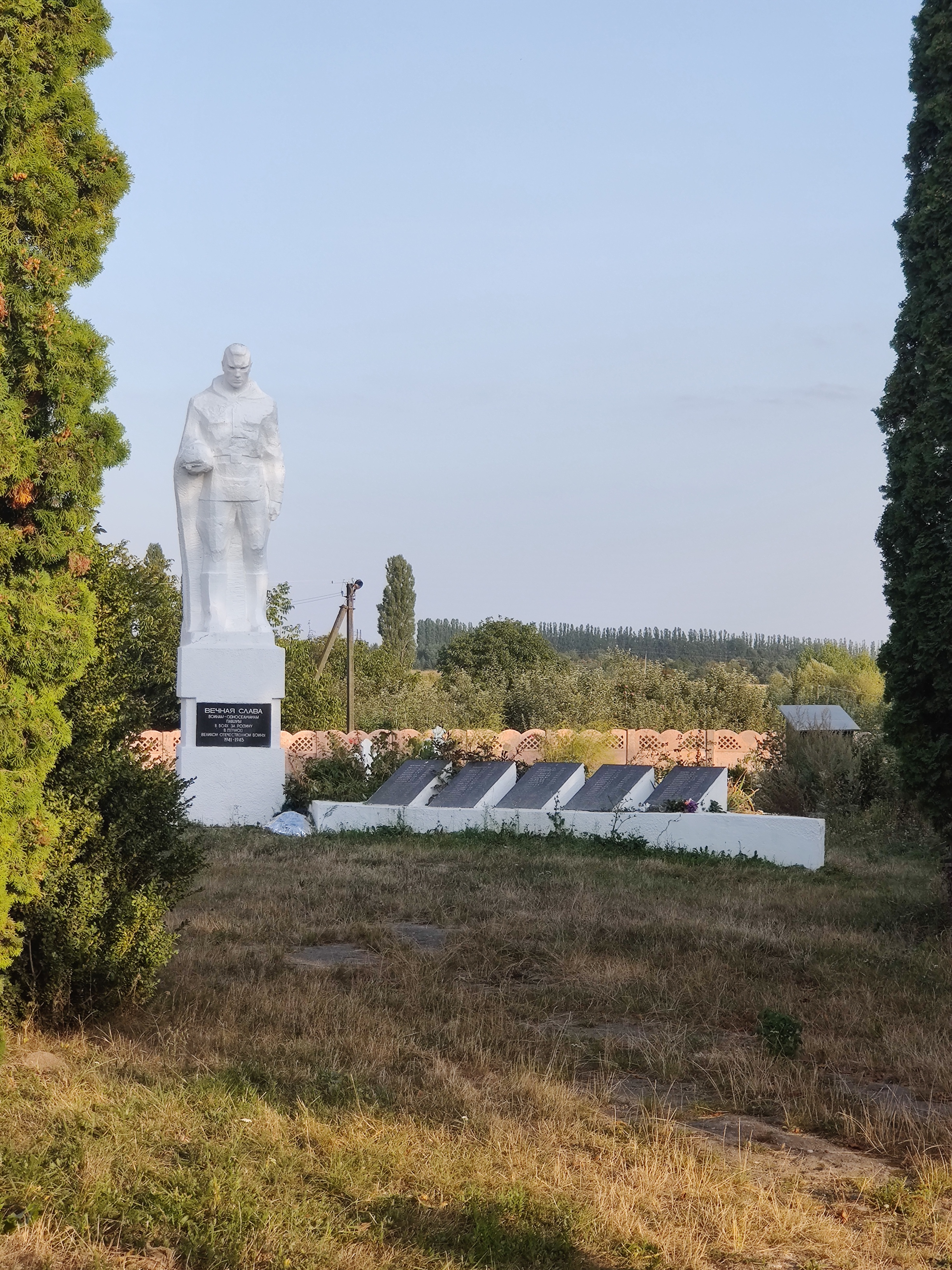 Пам'ятник 201 воїну-односельчанину, загиблим на фронтах Великої Вітчизняної війни, Комарівці, біля Будинку культури